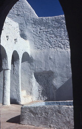 Ghardaïa, Algérie : Béni Isguen, maison de la palmeraie